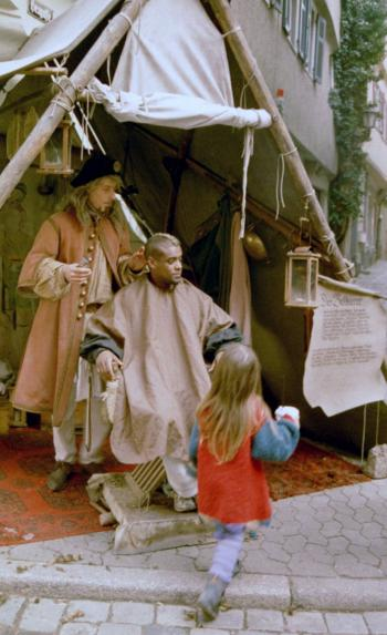 Esslingen - Weihnachtsmarkt - Friseur